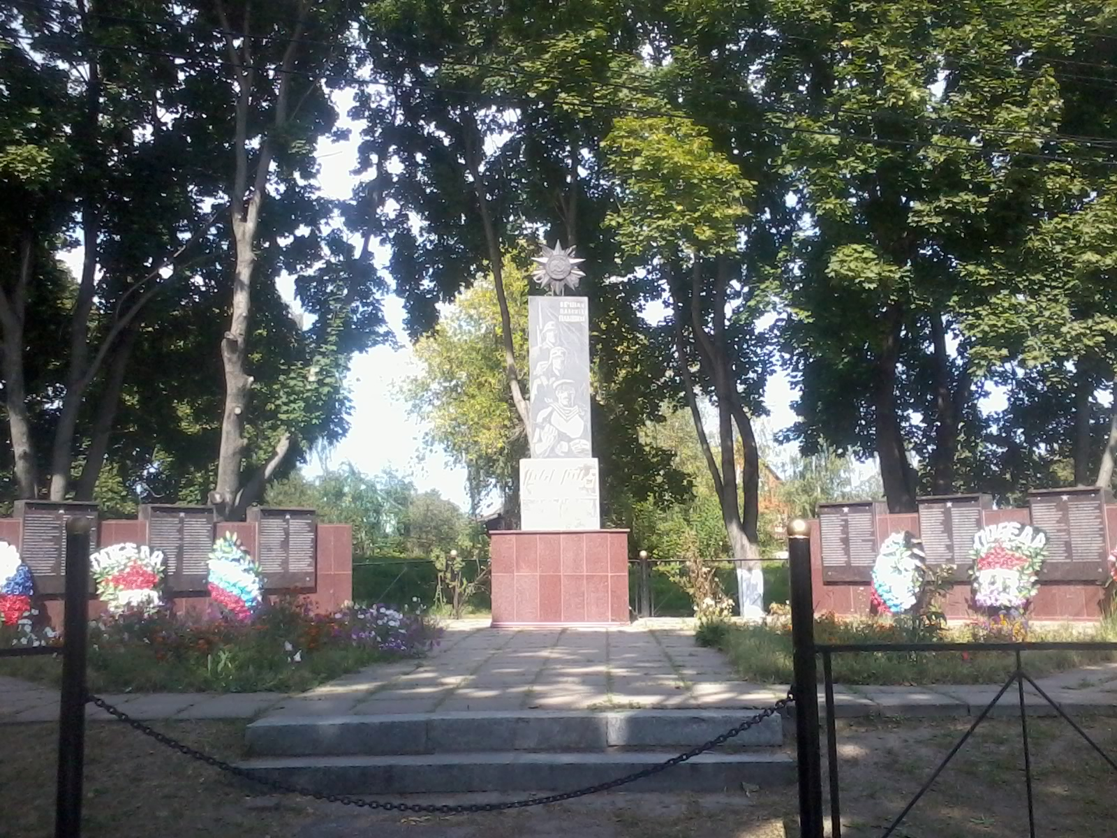 Памятник ВОВ